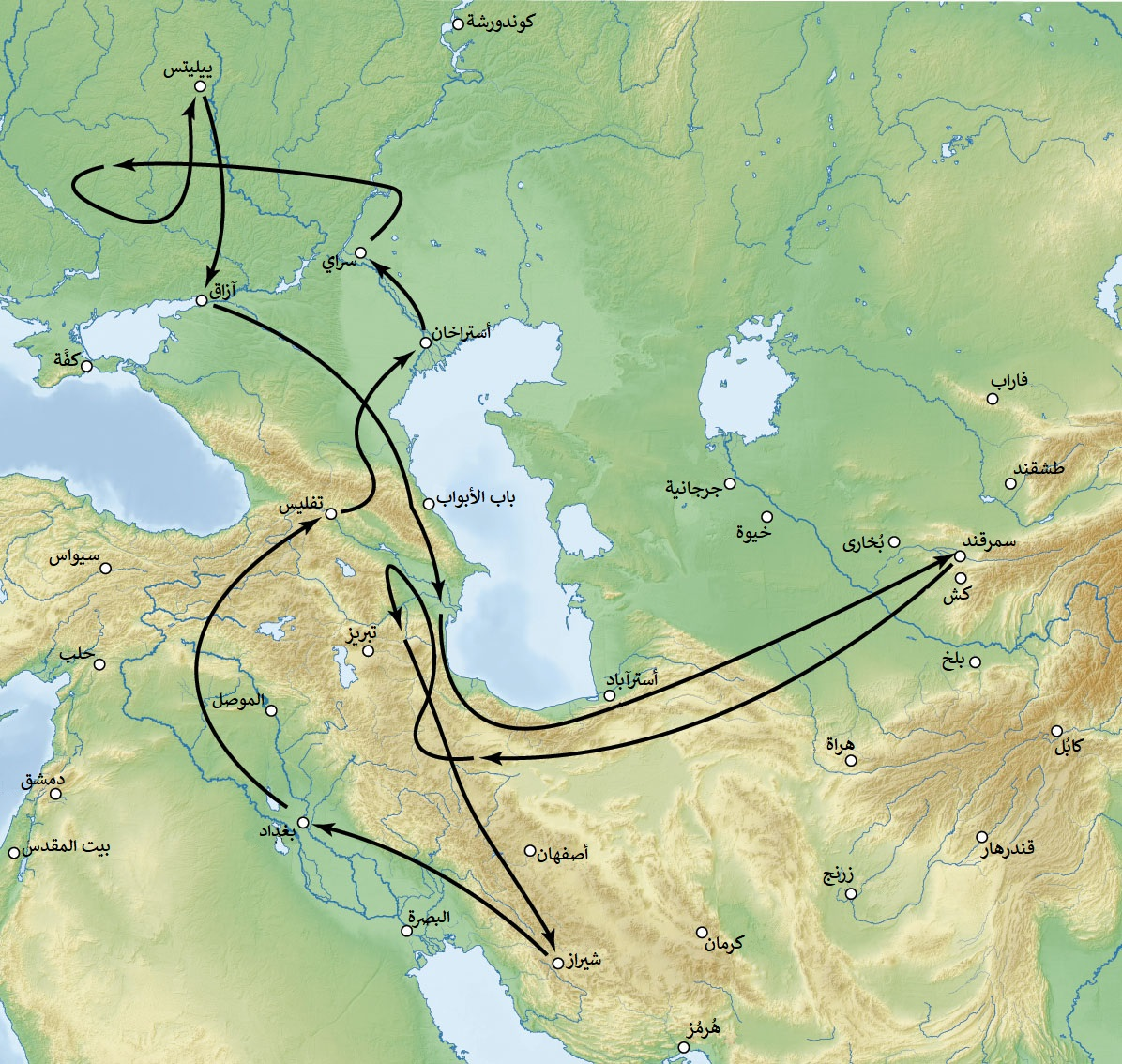 الحملة التيموريَّة ضدَّ مغول القبيلة الذهبيَّة ما بين سنتيّ 1392 و1396م.